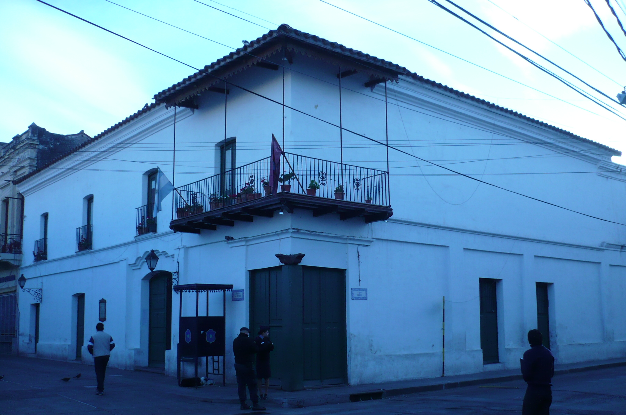 Construida aproximadamente en el año 1780